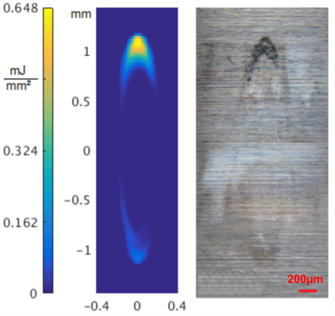 Vergleich zwischen simulierter Reibarbeitsdichte und Verschleiß der Lagerlaufbahn (trockene Anwendung)